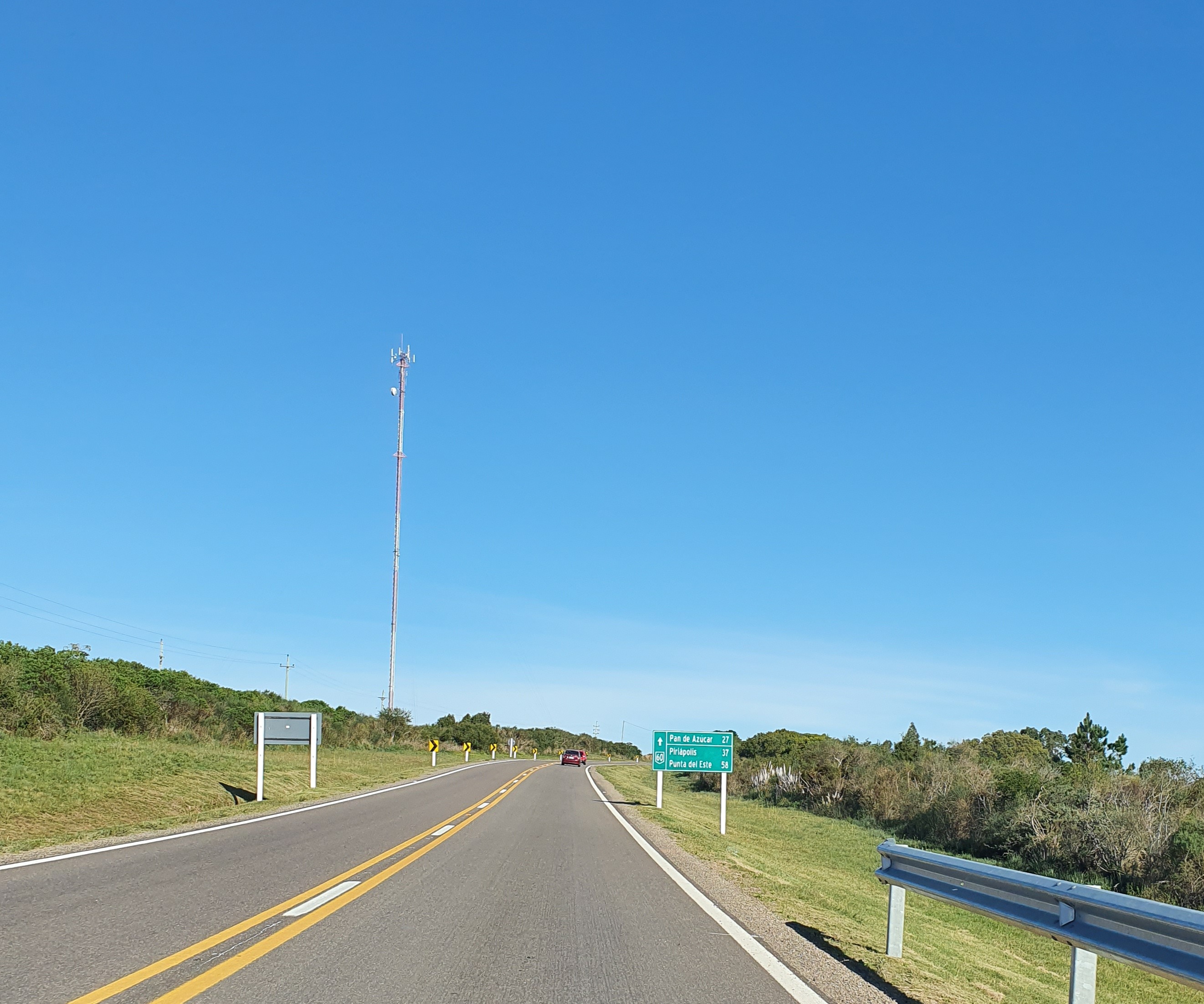 Ruta 60 km 39 sentido sur